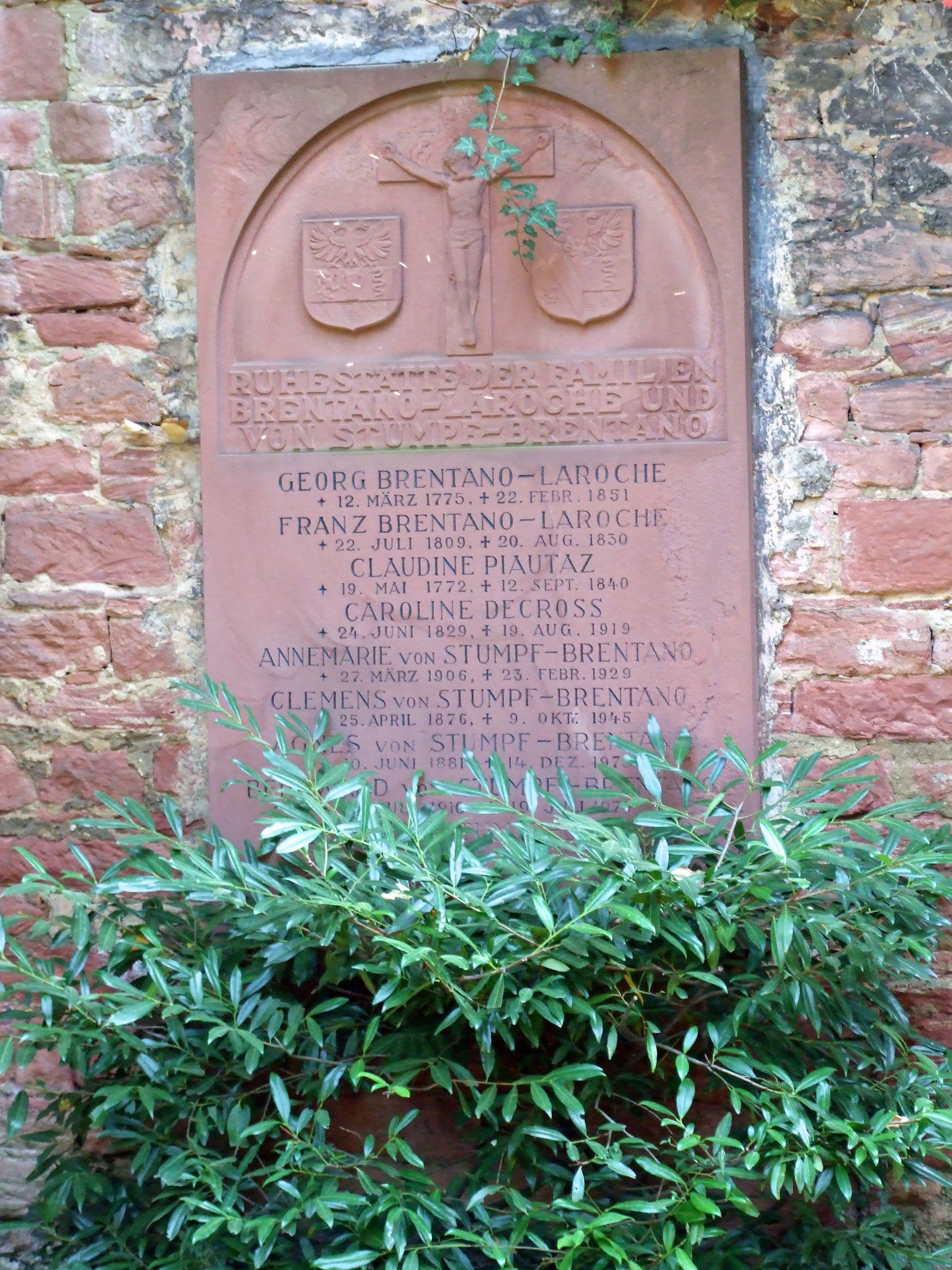 Brentano Grabmal auf dem Hauptfriedhof in Ffm